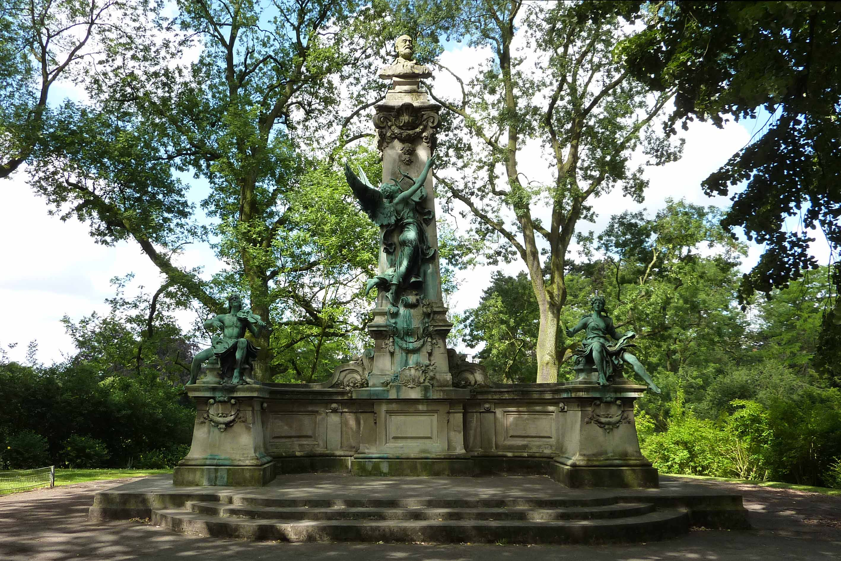 ROUBAIX - Monument de Gustave Nadaud - Parc Barbieux